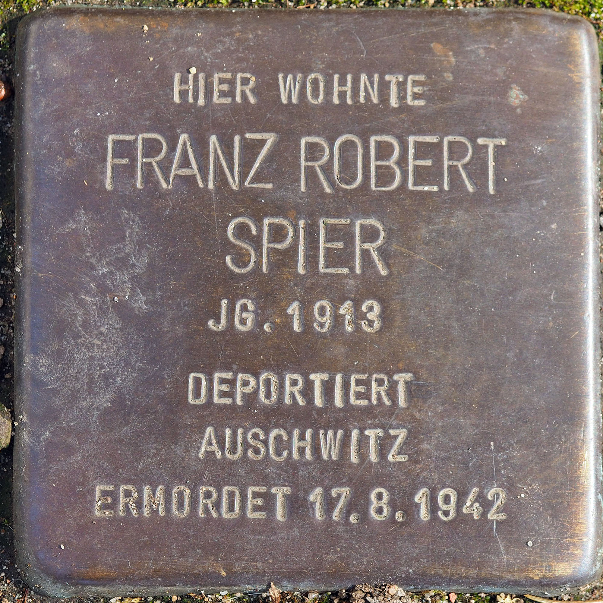 Stolpersteine MG: Spier, Franz Robert